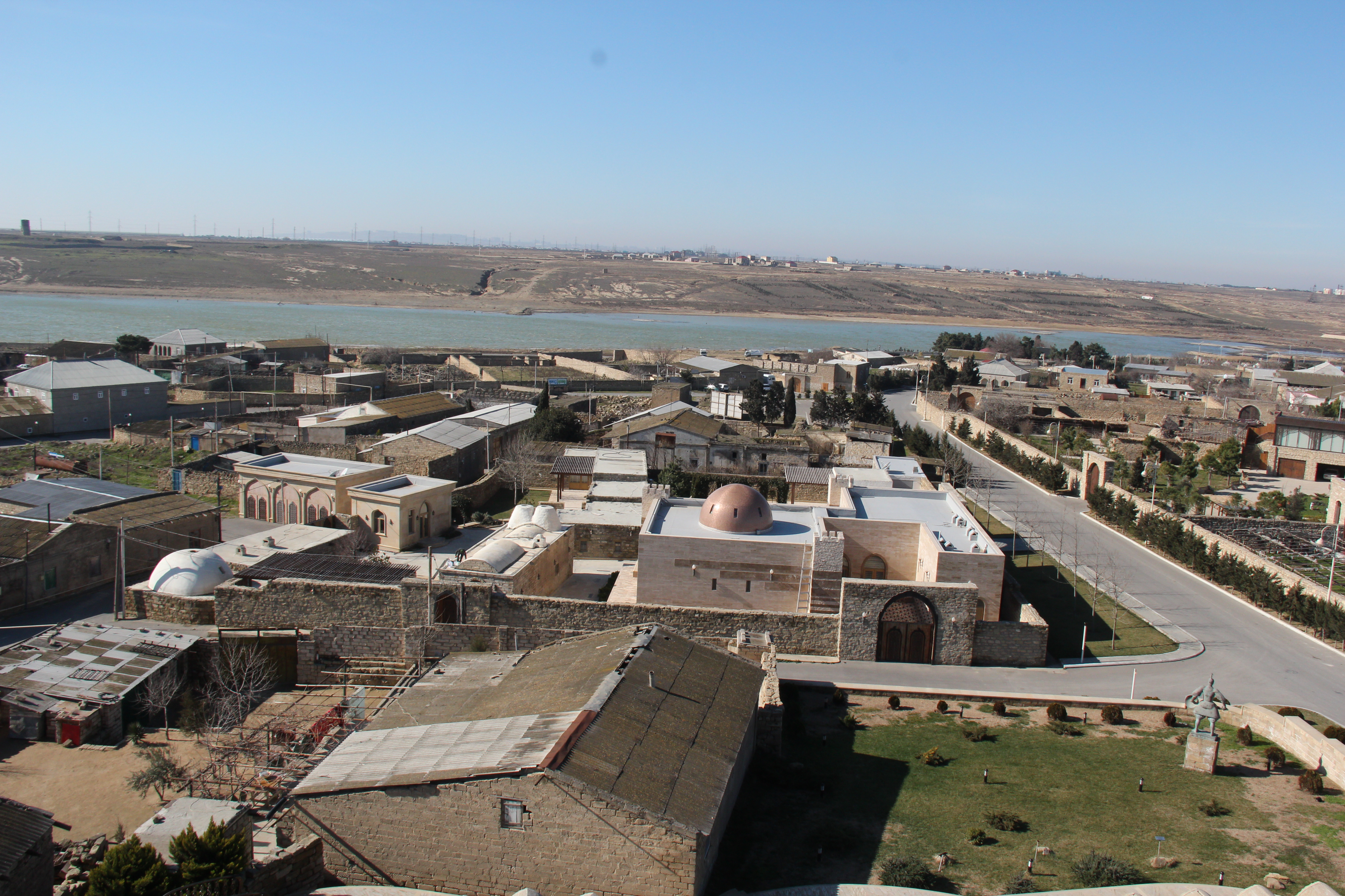 Territory of Gala State Historical Ethnographic Preserve